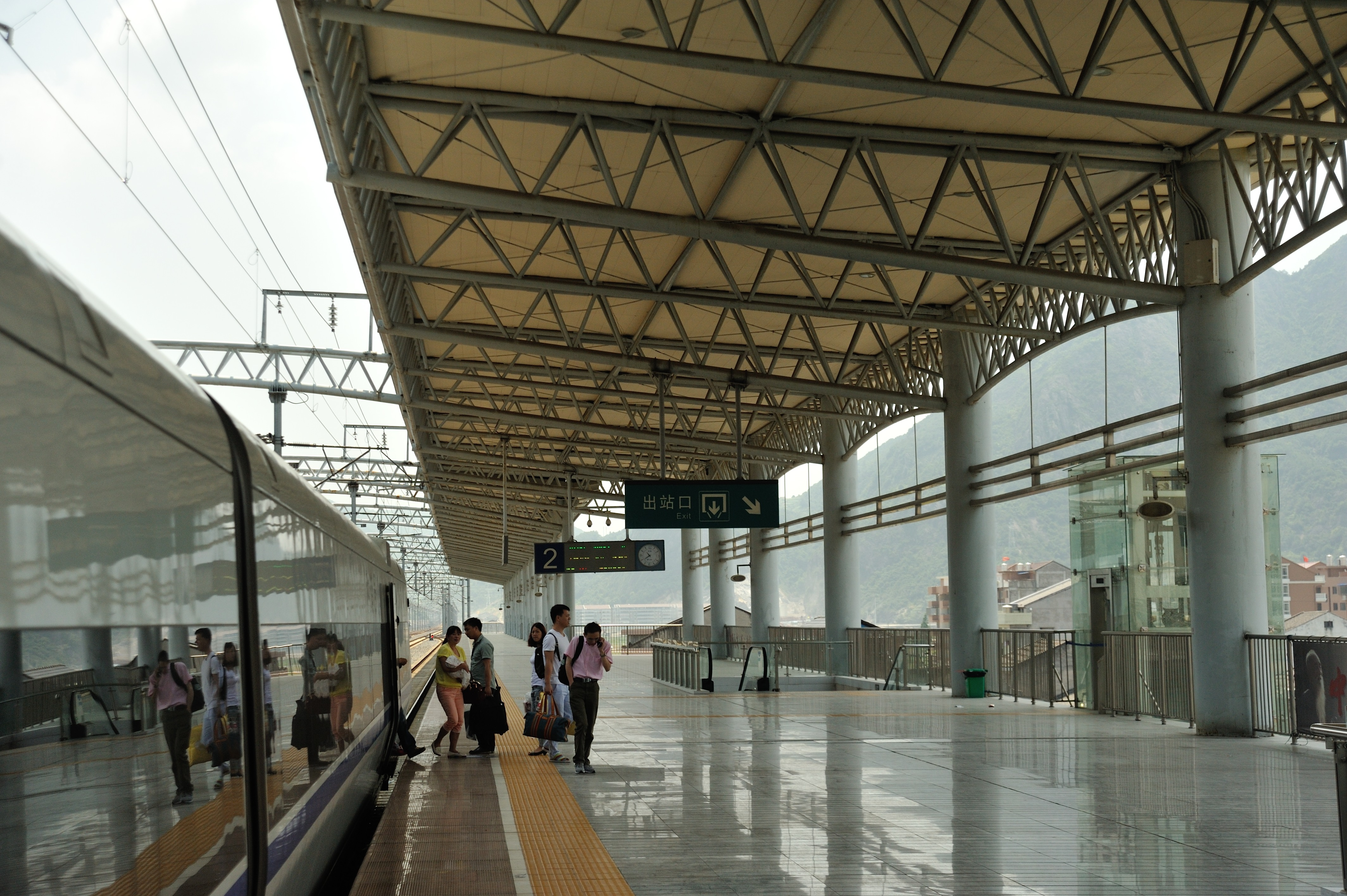 永嘉站站台